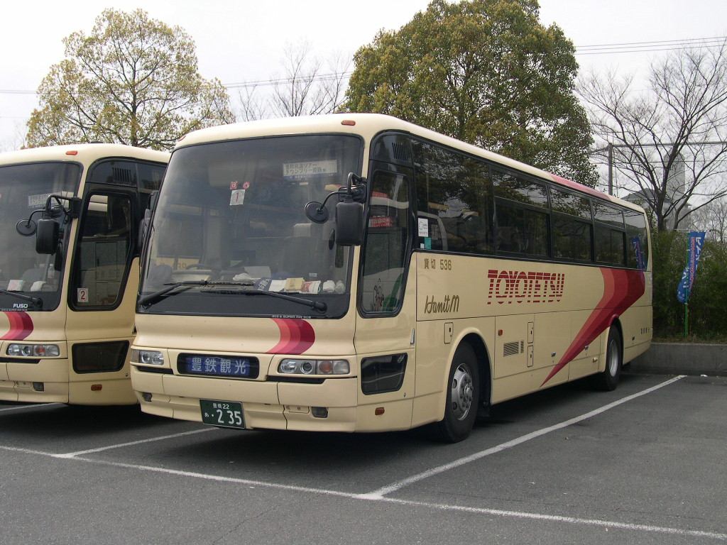 姫路城貸切バス駐車場にて 2004-4-11撮影